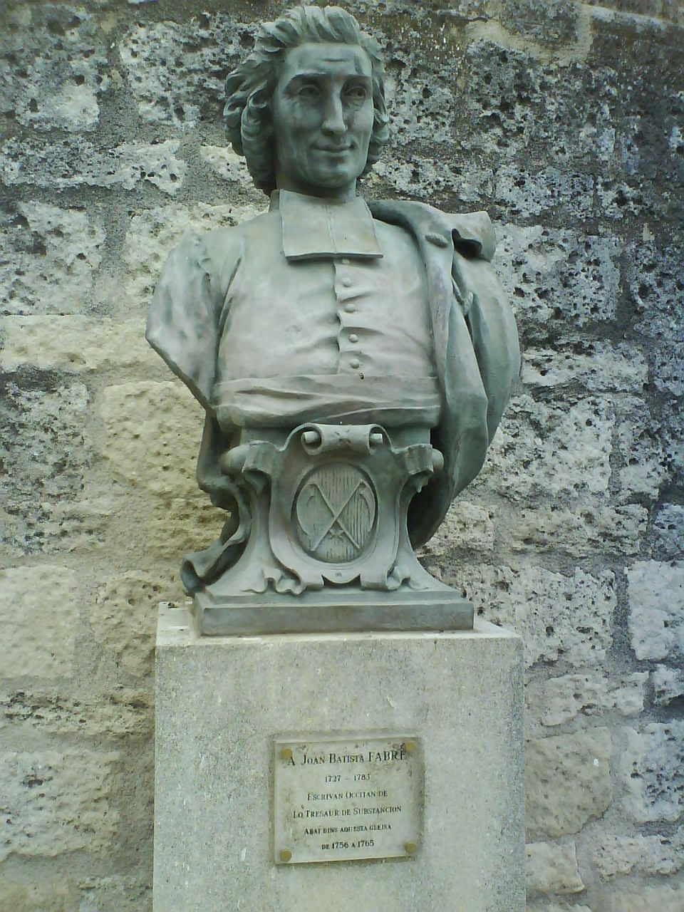 Abbé Jean-Baptiste Fabre (1727-1783), buste à Castelnau-le-Lez (Hérault)